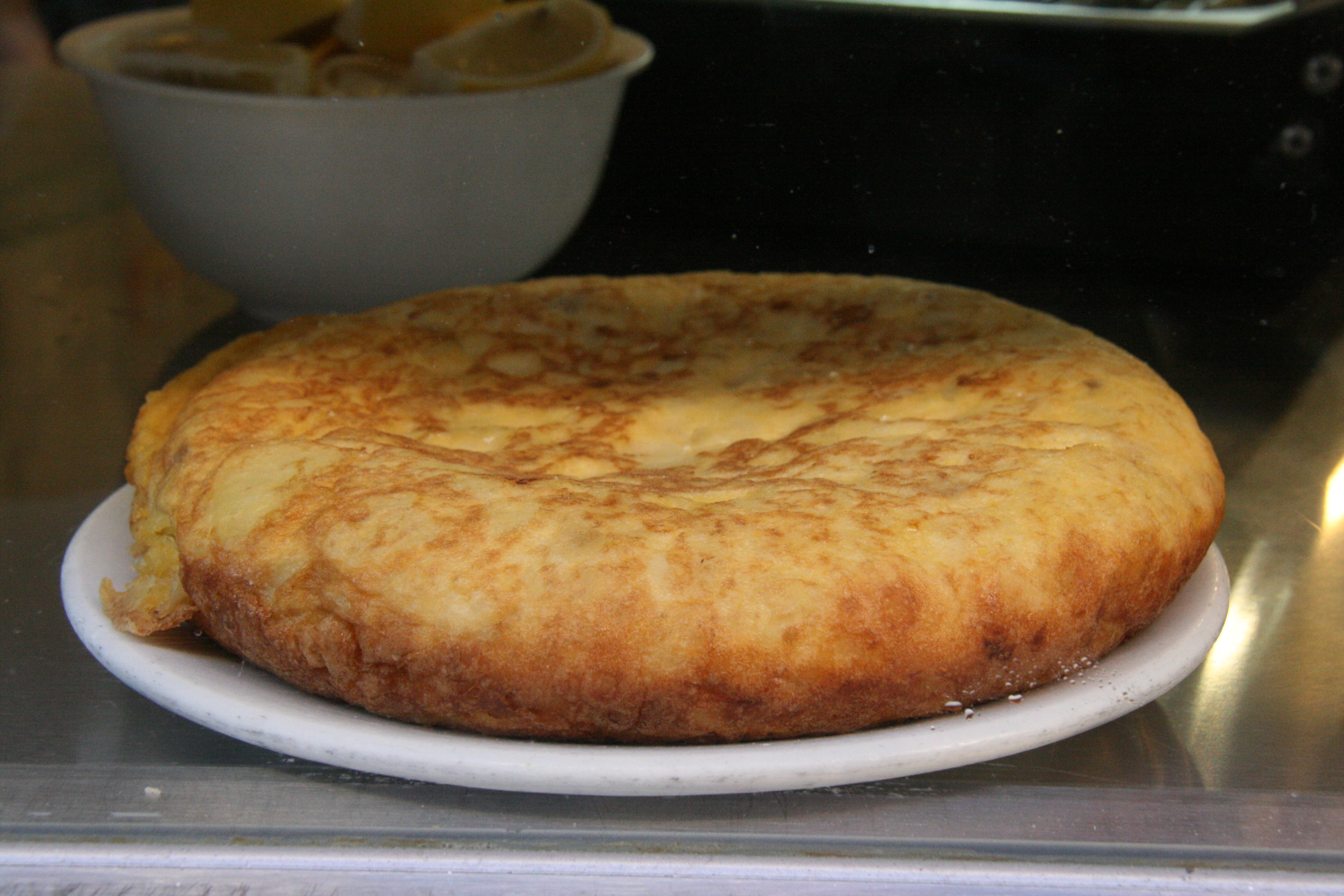 Plato de tortilla